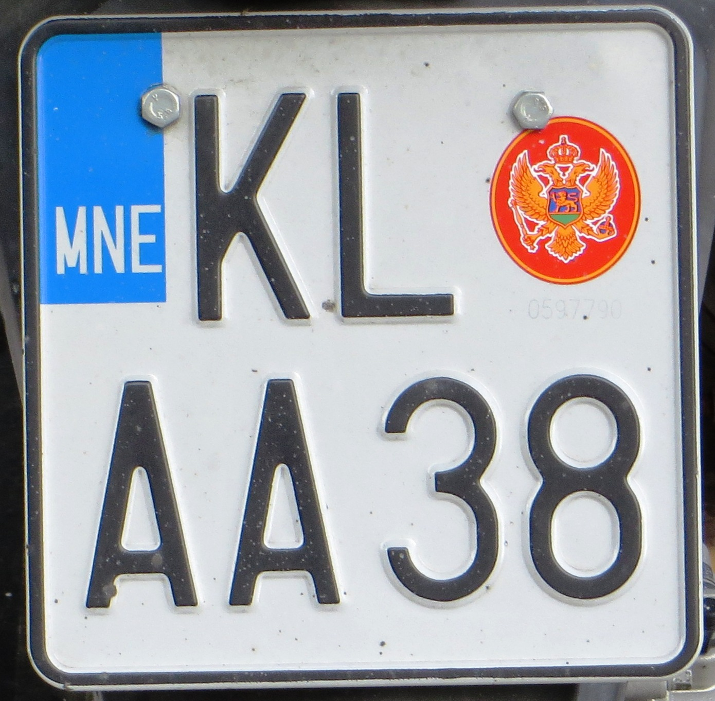 Kentekenplaat motorfiets Montenegro